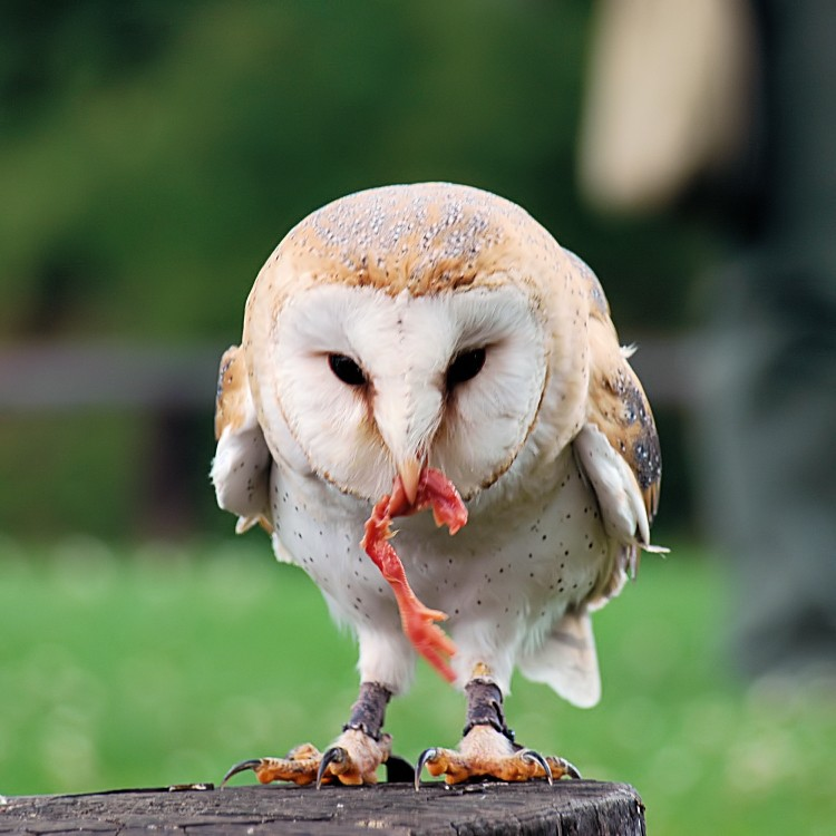 Schleiereule bei der Fütterung Tyto alba